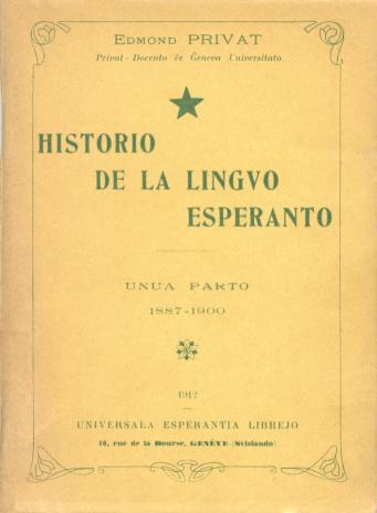 Edmond Privat: Historio de la lingvo Esperanto, Ĝenevo 1912